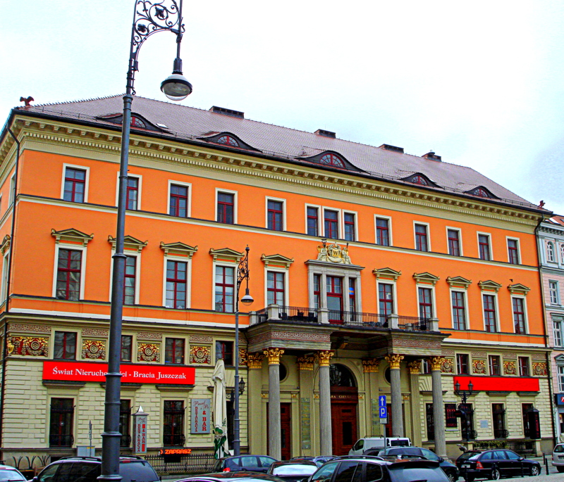 Wrocław Stare Miasto - pl. Solny 16 - Stara Giełda, obecnie budynek biurowy, 1822-1824